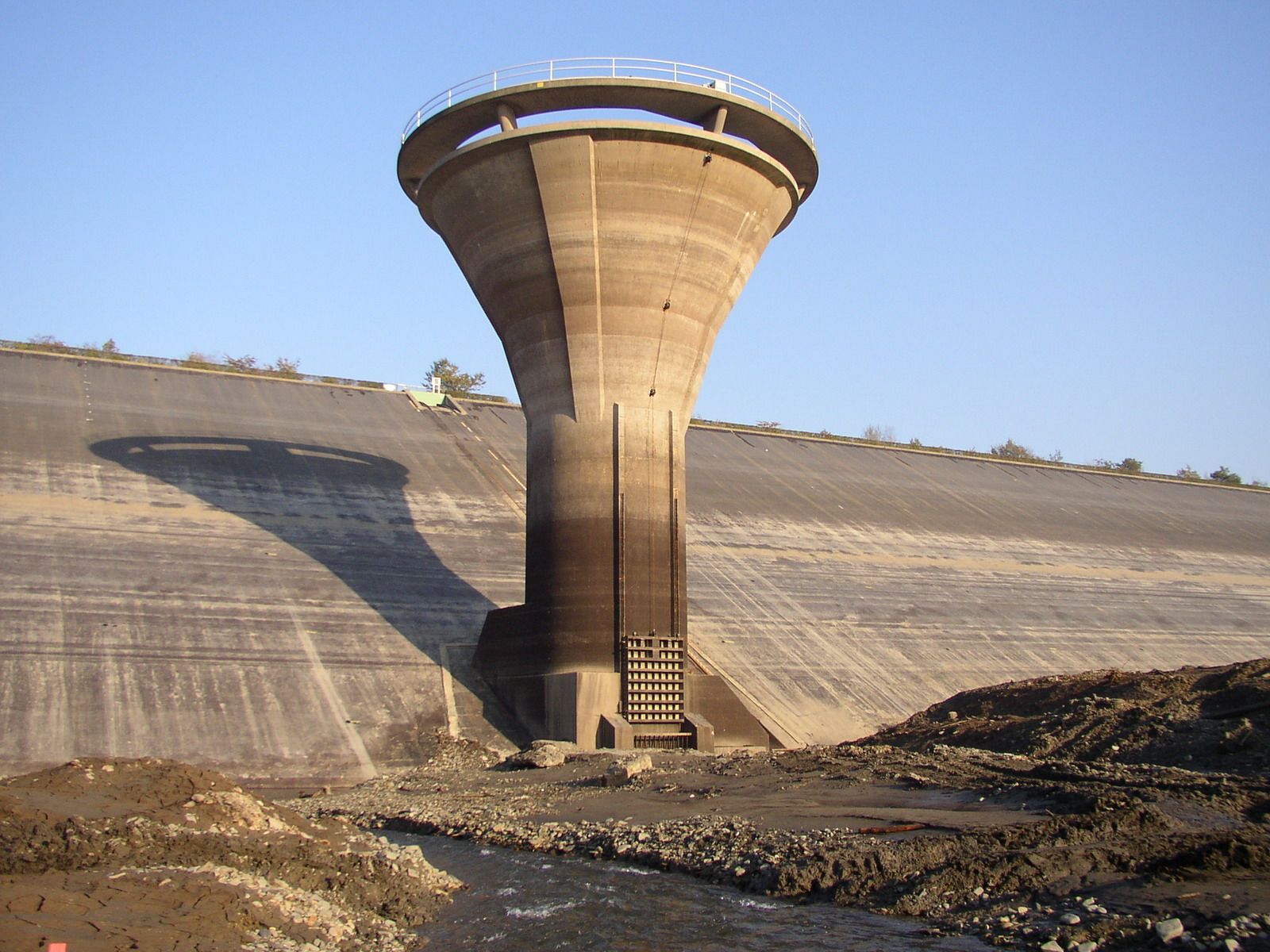 Innerstetalsperre – Überlaufturm, Staubecken nach Restentleerung vor der Sanierung des Staudamms